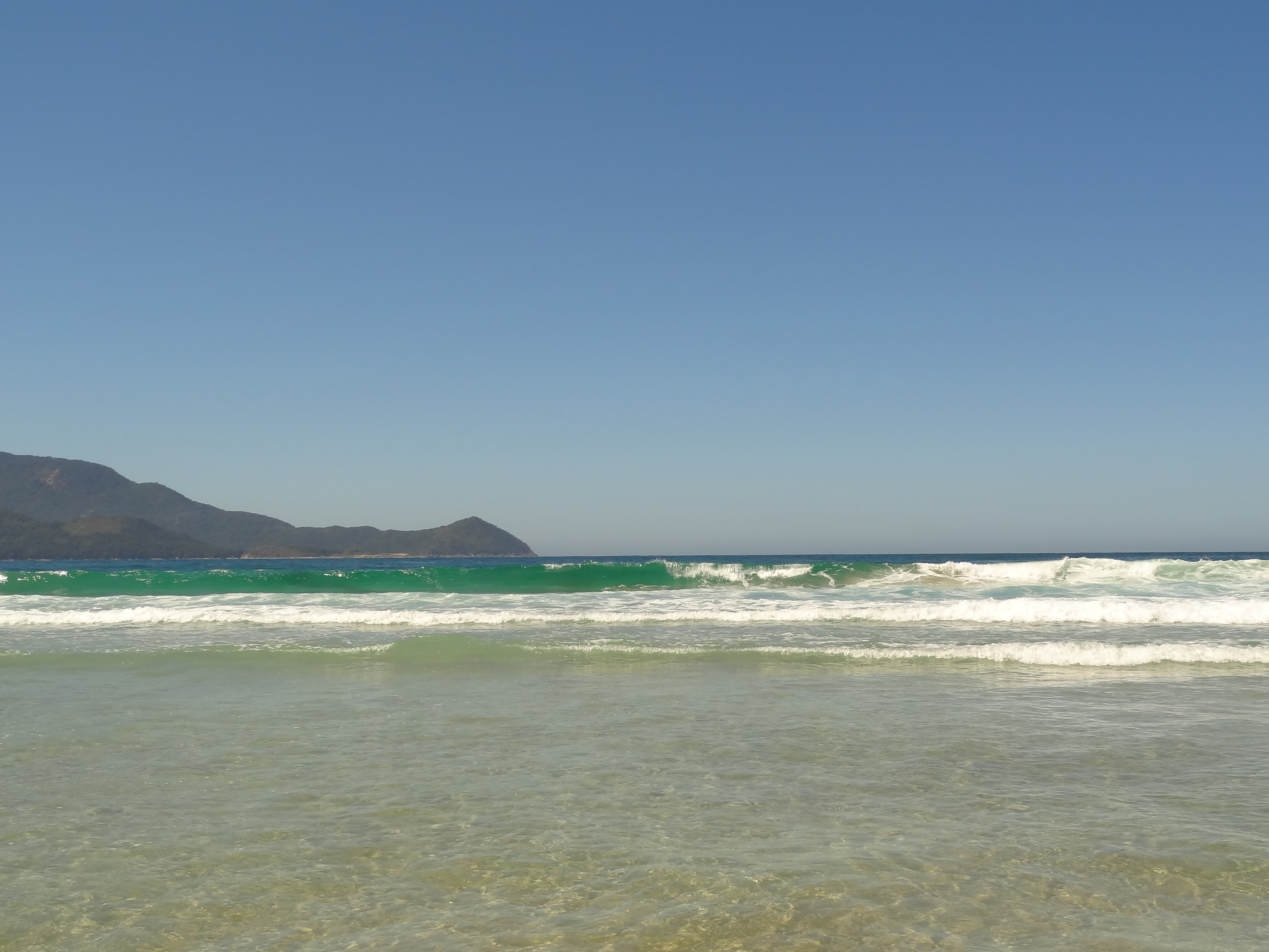 A Praia do Aventureiro é considerada uma das mais bonitas do Brasil. Em 1981 foi criada a Reserva Biológica da Praia do Sul com o intuito de conter a cobiça imobiliária na região. Já em 1990, a região da Vila do Aventureiro passou a integrar o Parque Estadual Marinho do Aventureiro, o que isolou a comunidade, já que uma unidade de conservação deste nível não pode ter ocupações. Dessa forma, em 2014, foi criada a Reserva de Desenvolvimento Sustentável do Aventureiro, a qual passou a integrar a comunidade.